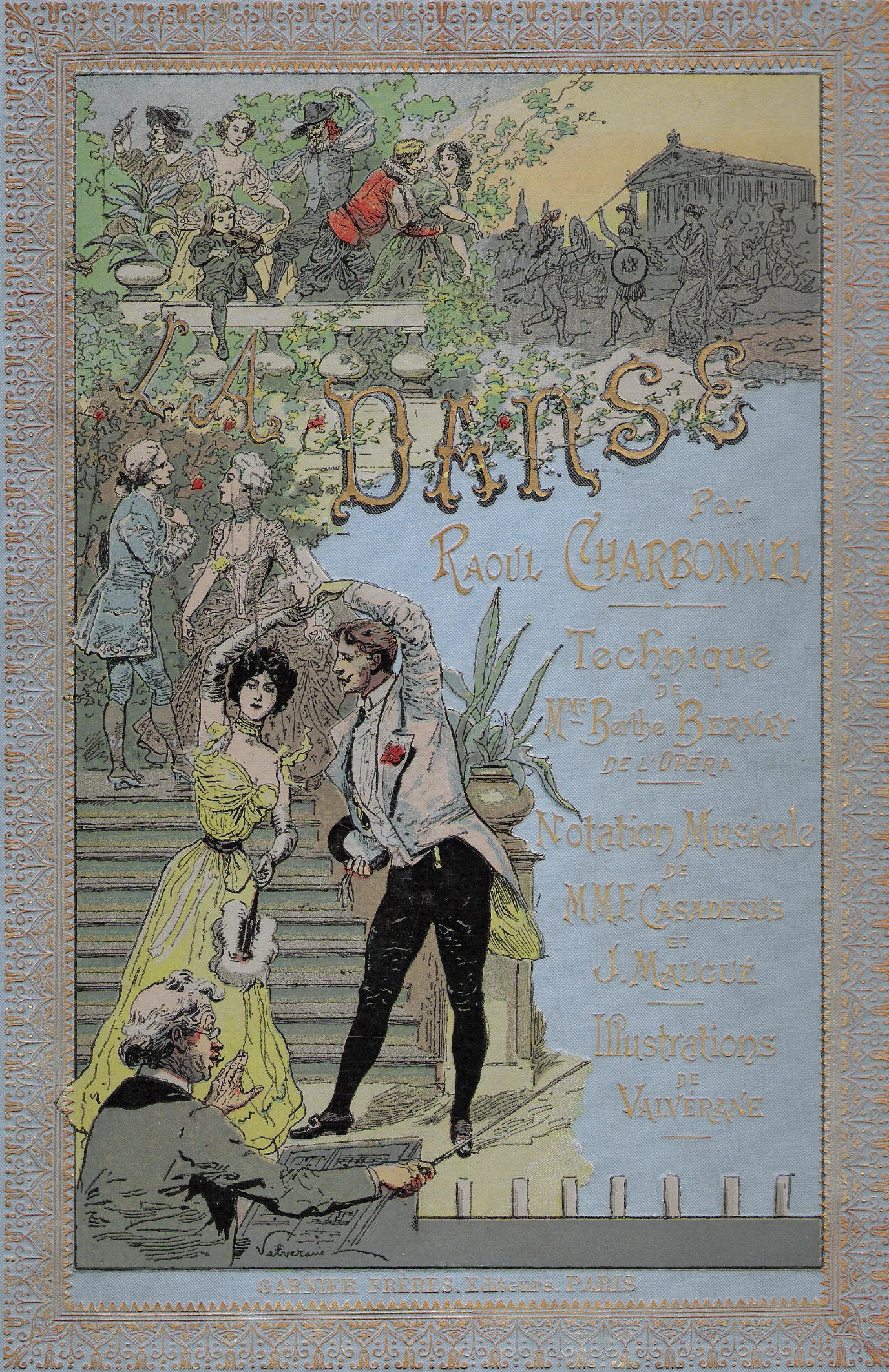 Couverture du livre La Danse de Raoul Charbonnel